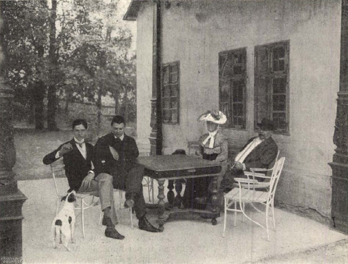 Mikszáth Kálmán horpácsi birtoka a Vasárnapi Ujságban – Mikszáth Kálmán (jobbra) és családja: Berci, Laci, Mauks Ilona